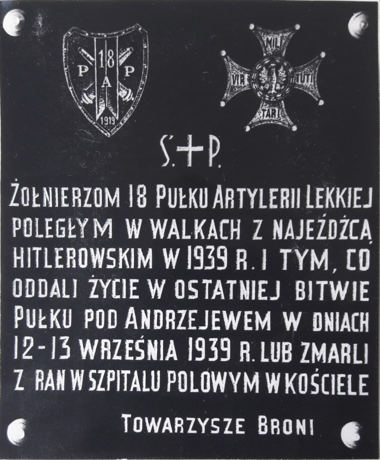 Tablica pamiątkowa ku czci żołnierzy 18 Pułku Artylerii Lekkiej wmurowana na filarze kościoła w Andrzejewie; 1972 r.